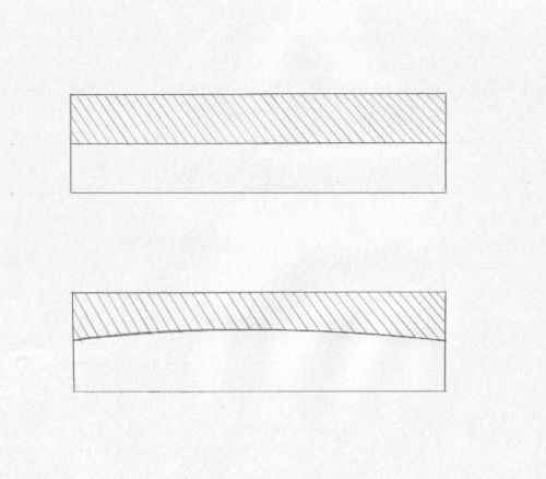 Fehér lapon két rajz, mindkettő téglalap. A felső téglalap felső része kb. 45 fokos vonalakkal satírozott a kontúrok párhuzamosak, az alsó téglalap felső része szintén satírozott, de homorú.